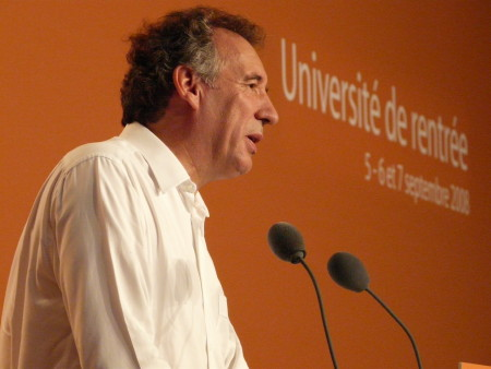 Photographie prise lors de la journée d'ouverture de l'Université de rentrée du Mouvement Démocrate à Cap Estérel, le 5 septembre 2008